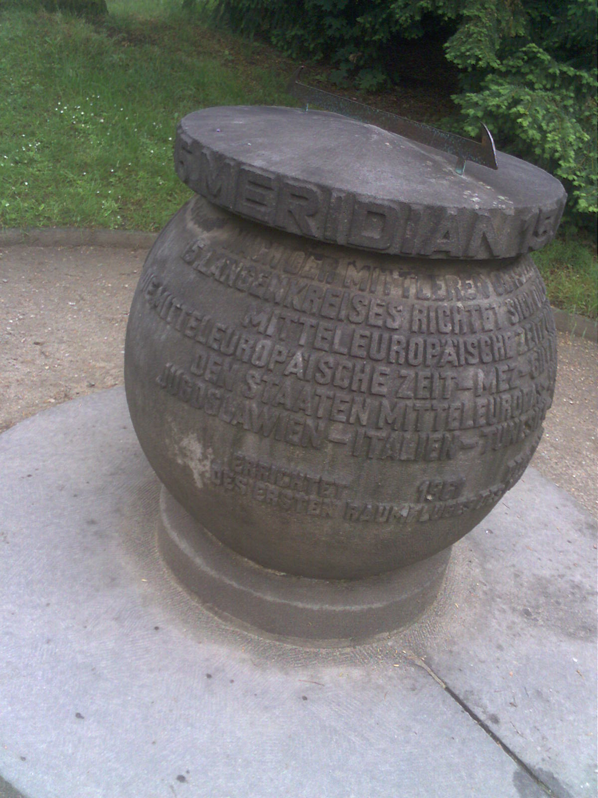 Görlitzer Meridianstein